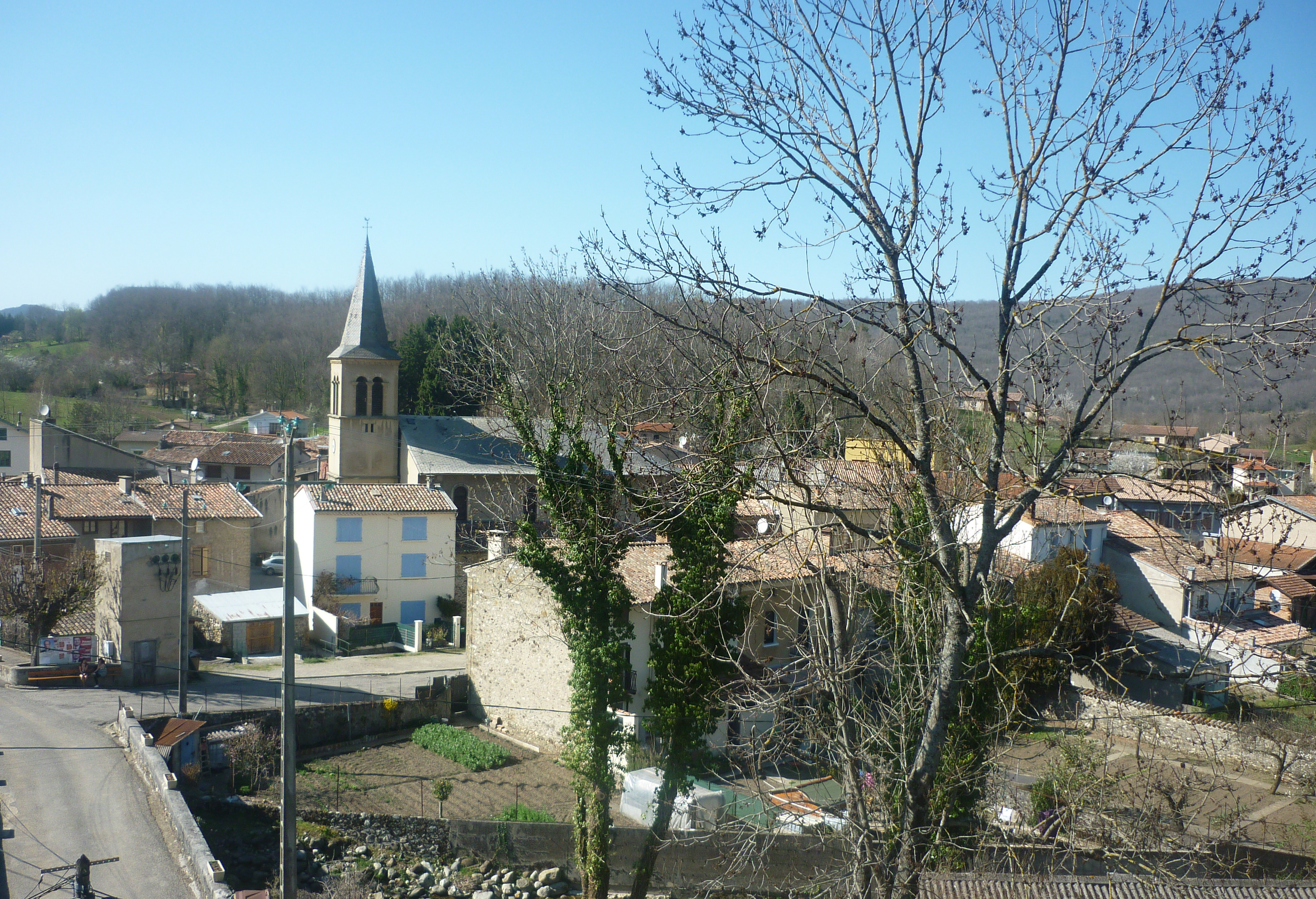 Vue du centre du village de Villeneuve-d'Olmes depuis la route de Bénaix (au premier plan) , vue de l'église